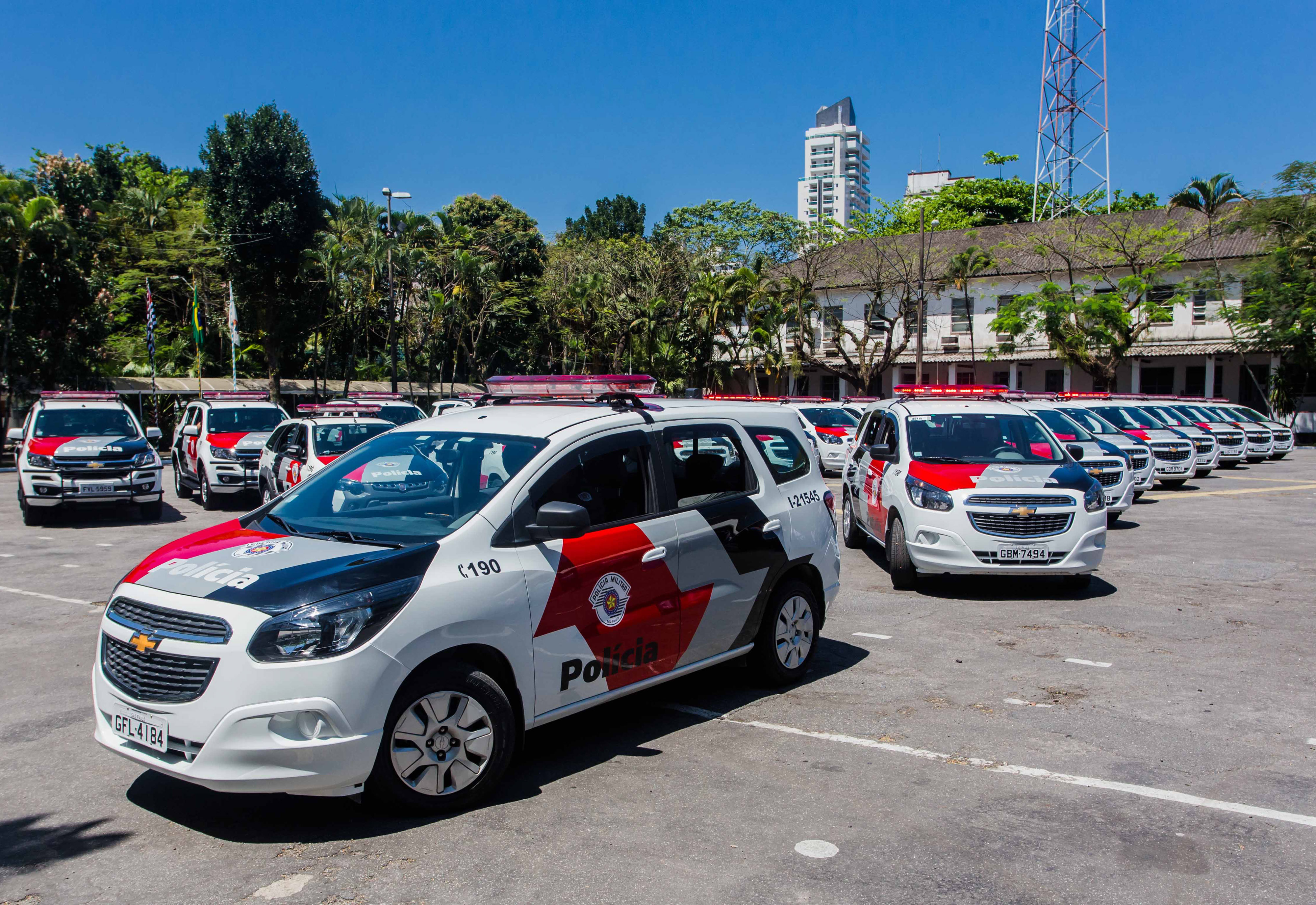 O Governador do Estado de São Paulo, Geraldo Alckmin, participou da Entrega de 57 viaturas da CPI-6. Local: Santos/SP. Data: 05/10/2017. Foto: Alexandre Carvalho/A2img